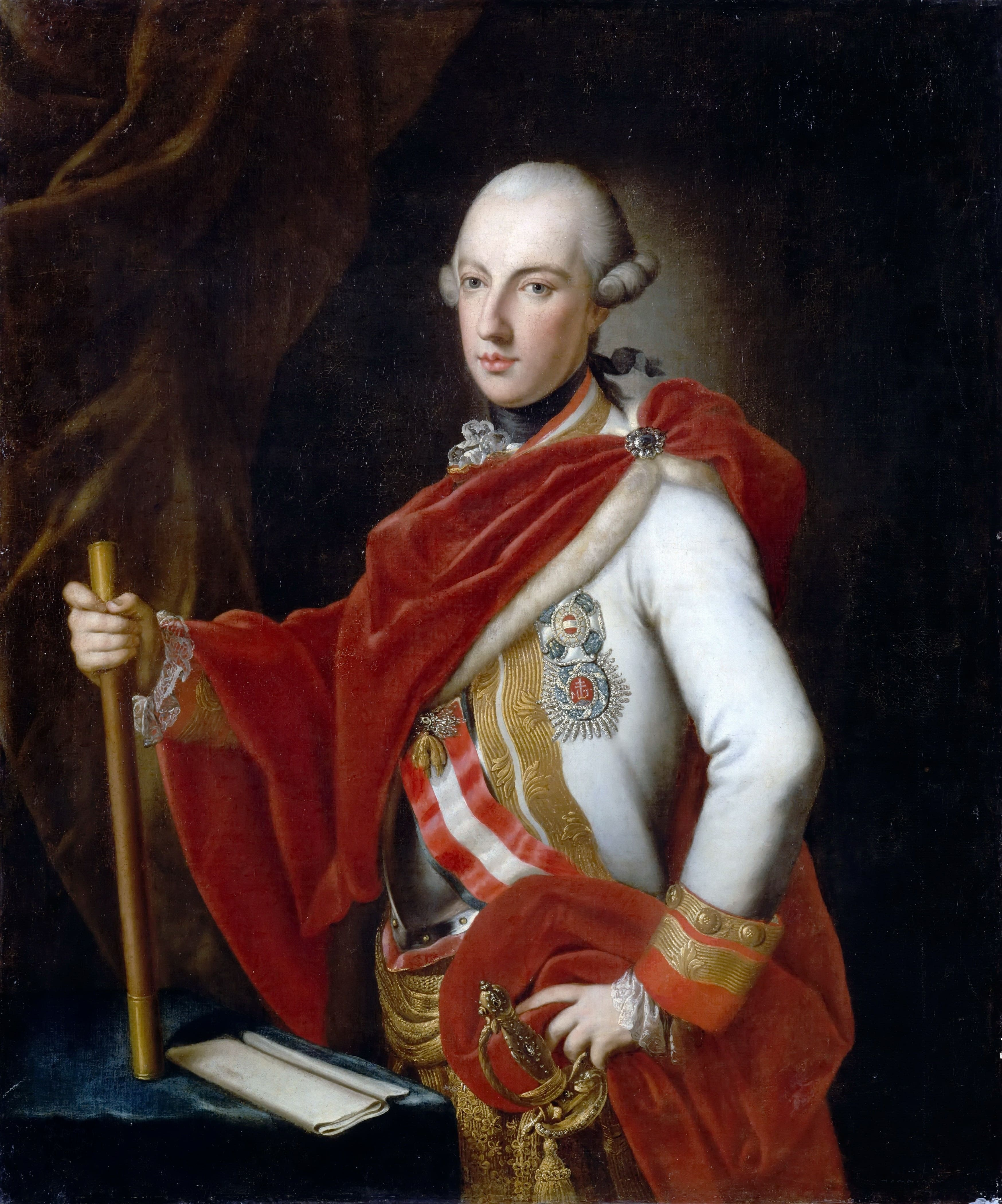 Empereur d'Autriche, roi de Hongrie et de Bohême en 1780 - en uniforme de feld-maréchal d'Autriche, portant la Toison d'Or, les Ordres militaires de Marie-Thérèse et la plaque de l'ordre de Saint-Etienne de Hongrie - vers 1772